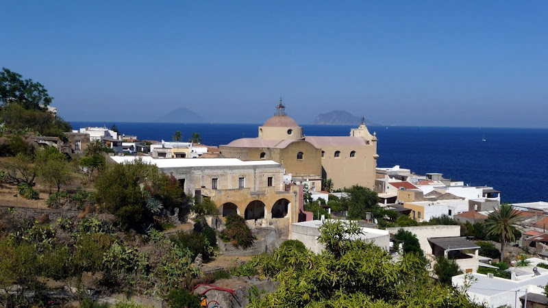 Noi siamo cosi! Ningú ens ve a rebre??